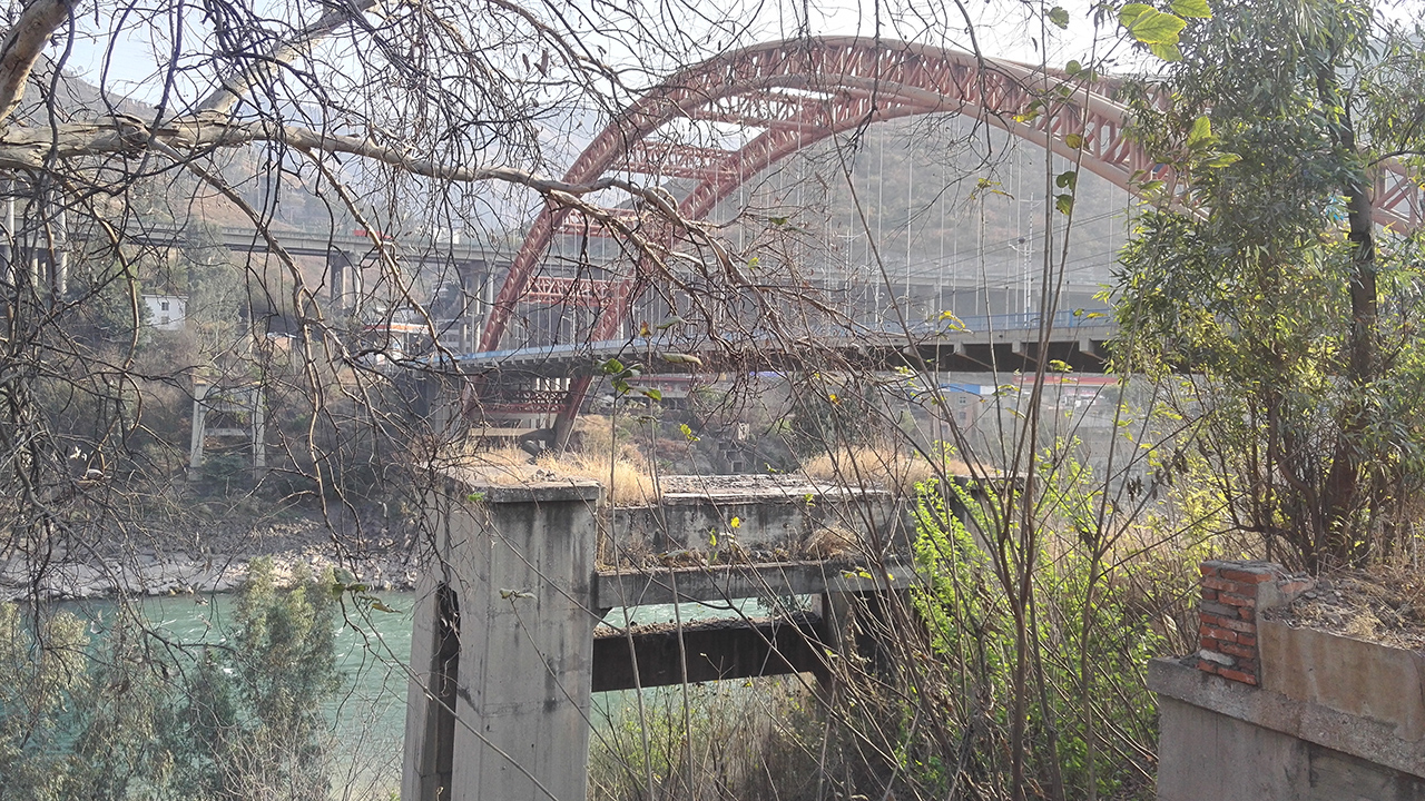 法拉大桥是金沙江上的一座公路桥，位于攀枝花市，紧挨着沿江吊桥（3004桥）。沿江吊桥在法拉大桥建成后被拆除。图为法拉大桥及其近旁如今仅剩桥墩和桥台的沿江吊桥。